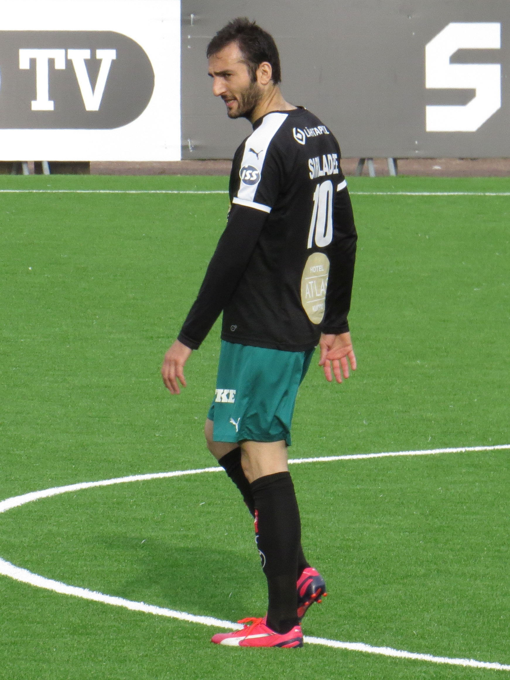 Irakli Sirbiladze, georgialainen jalkapalloilija Kuopion Palloseuran paidassa kaudella 2015.